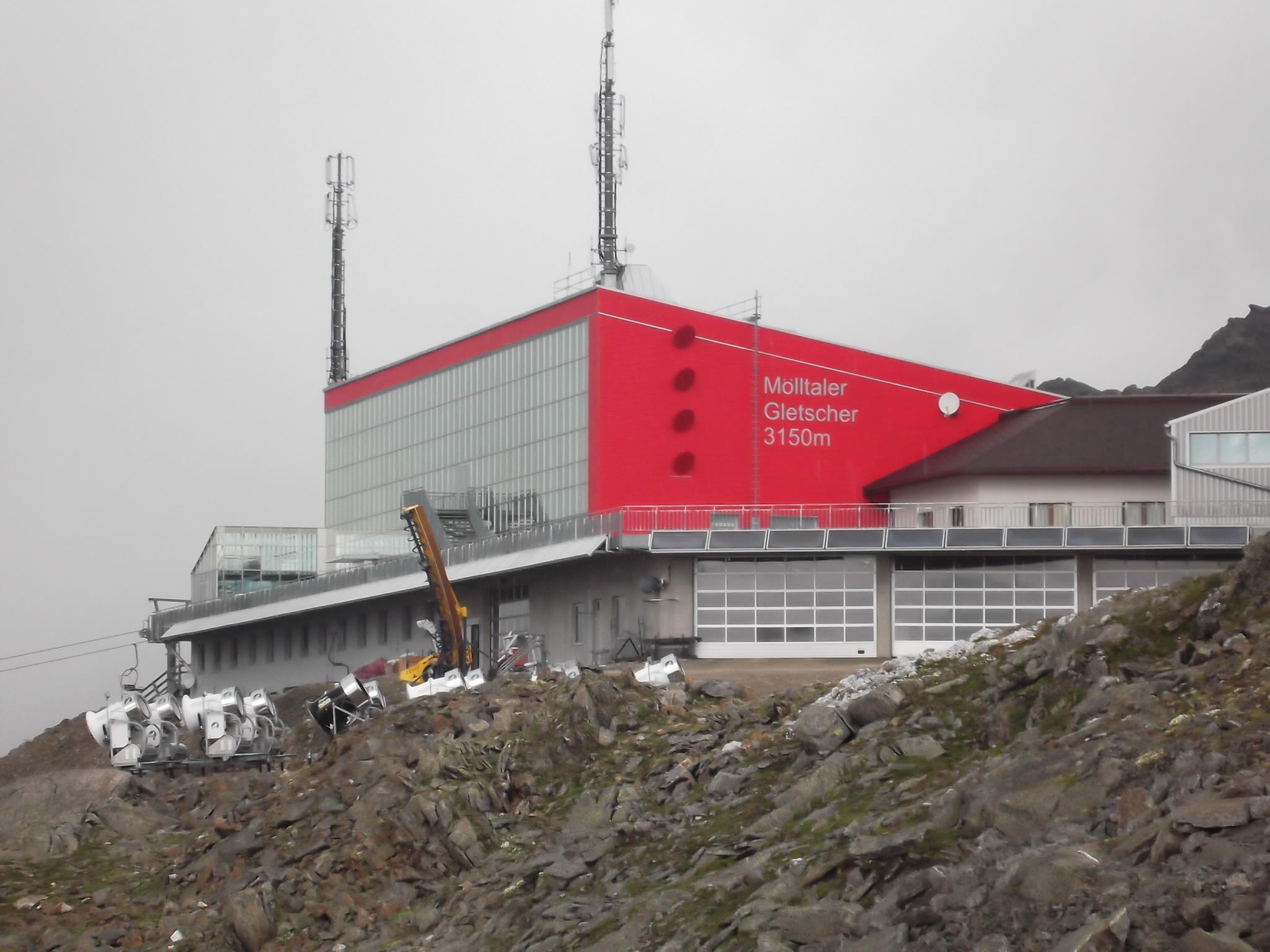 Eisseehaus (2795m): die Bergstation der Eissee(gondel)bahn zum Mölltaler Gletscher